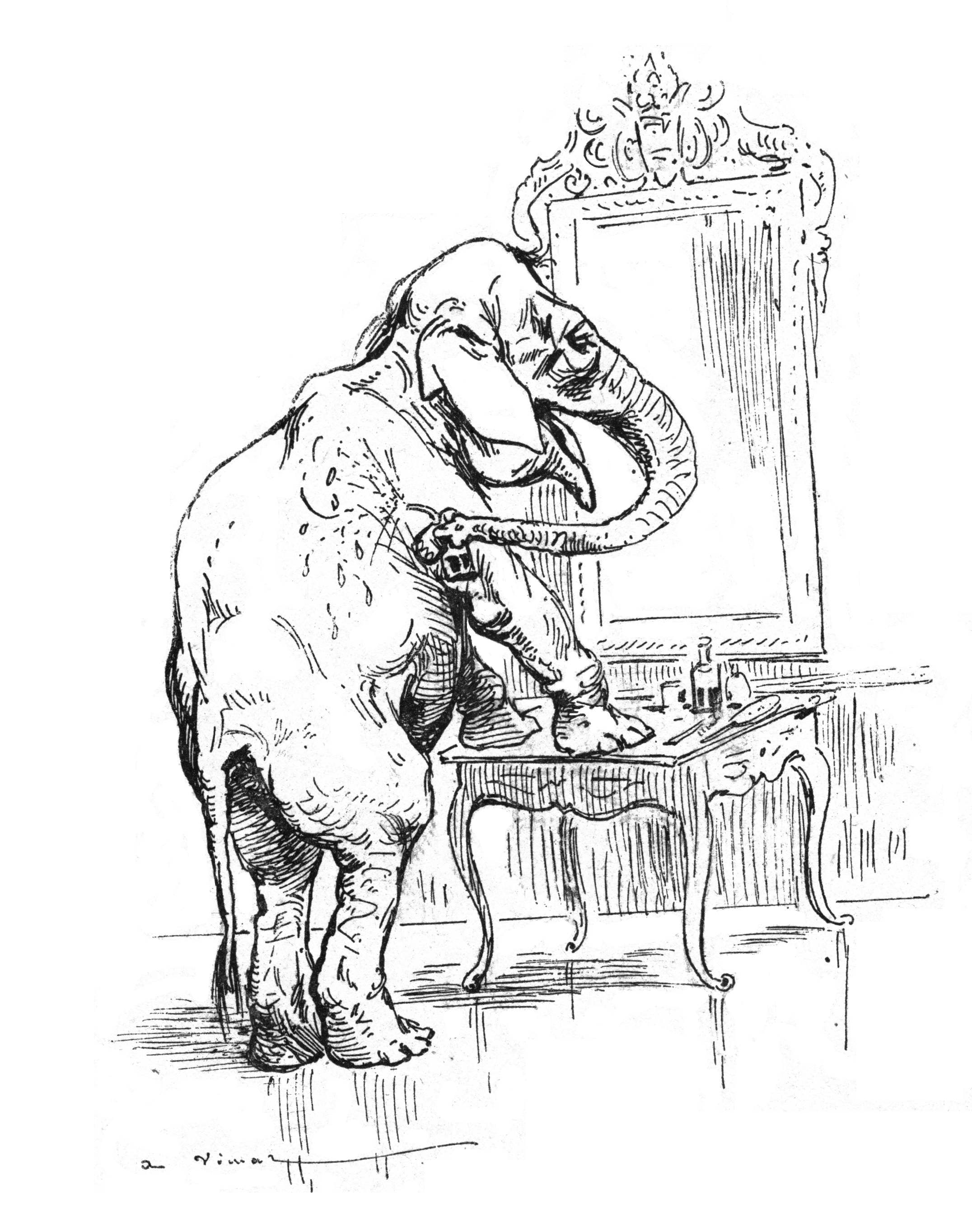 Illustration du livre Le Boy de Marius Bouillabès d'Auguste Vimar, éditeur H. Laurens Paris - 1928 - page 31